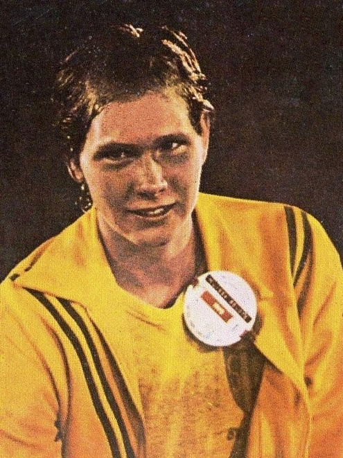 CAMPIONI dello SPORT 1973/74-Figurina n.235- BELOTE - NUOTO -Rec